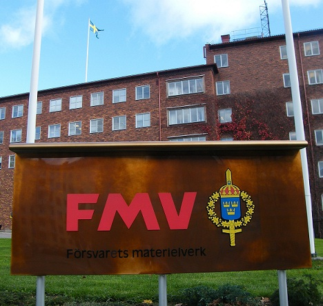 Huvuddelen av FMV finns i byggnaden Tre Vapen i Stockholm